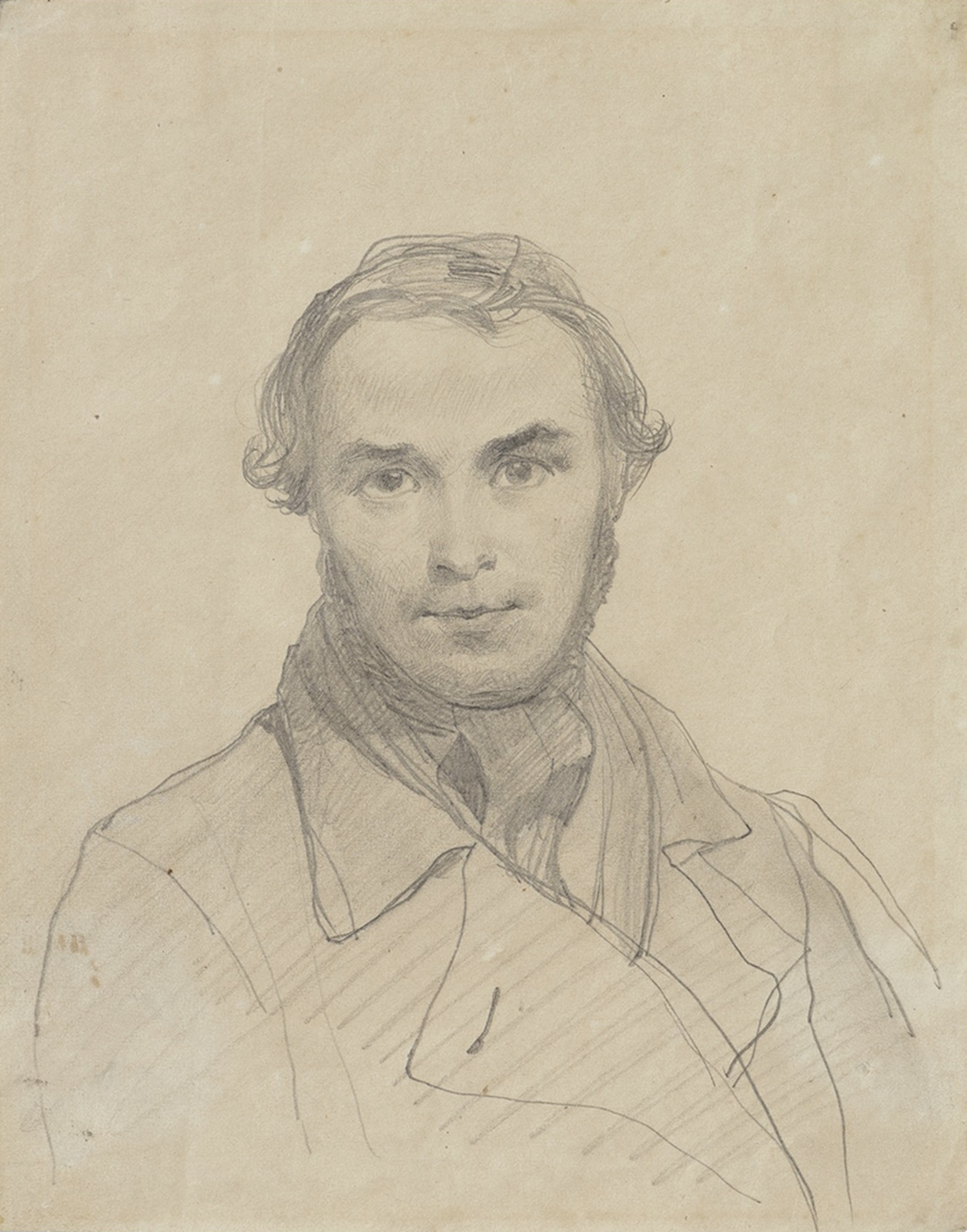 На звороті внизу чорним чорнилом напис російською мовою В. В. Тарновського (молодшого): Портрет Т. Шевченка, зроблений ним самим у дзеркало у 1845 році в с. Потоки Київської губ. і подарований своїй кумі Н. В. Тарновській